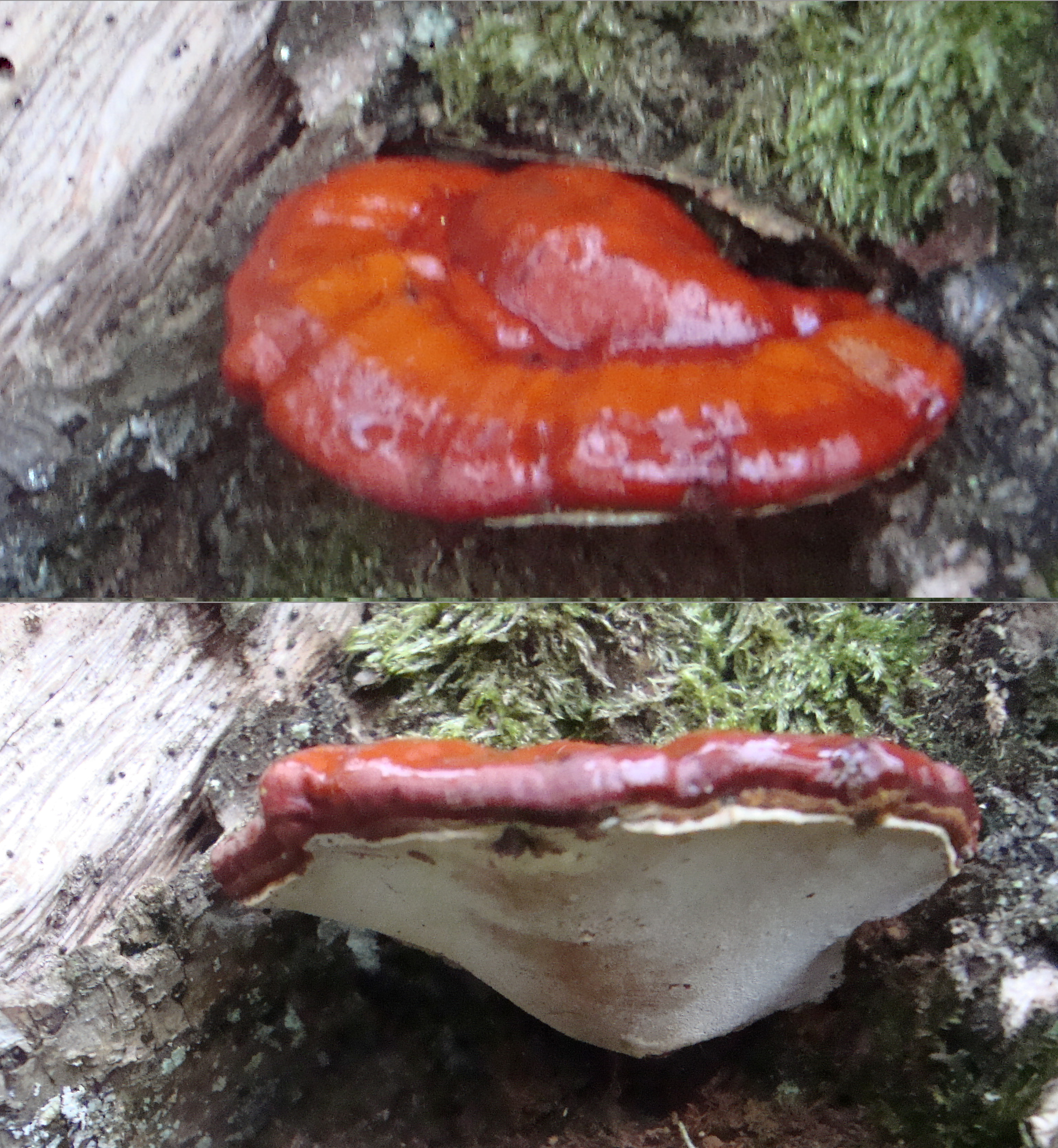 Houba v Podkomorských lesích, Česká republika, jižní Morava. Lesklokorka lesklá Ganoderma lucidum.